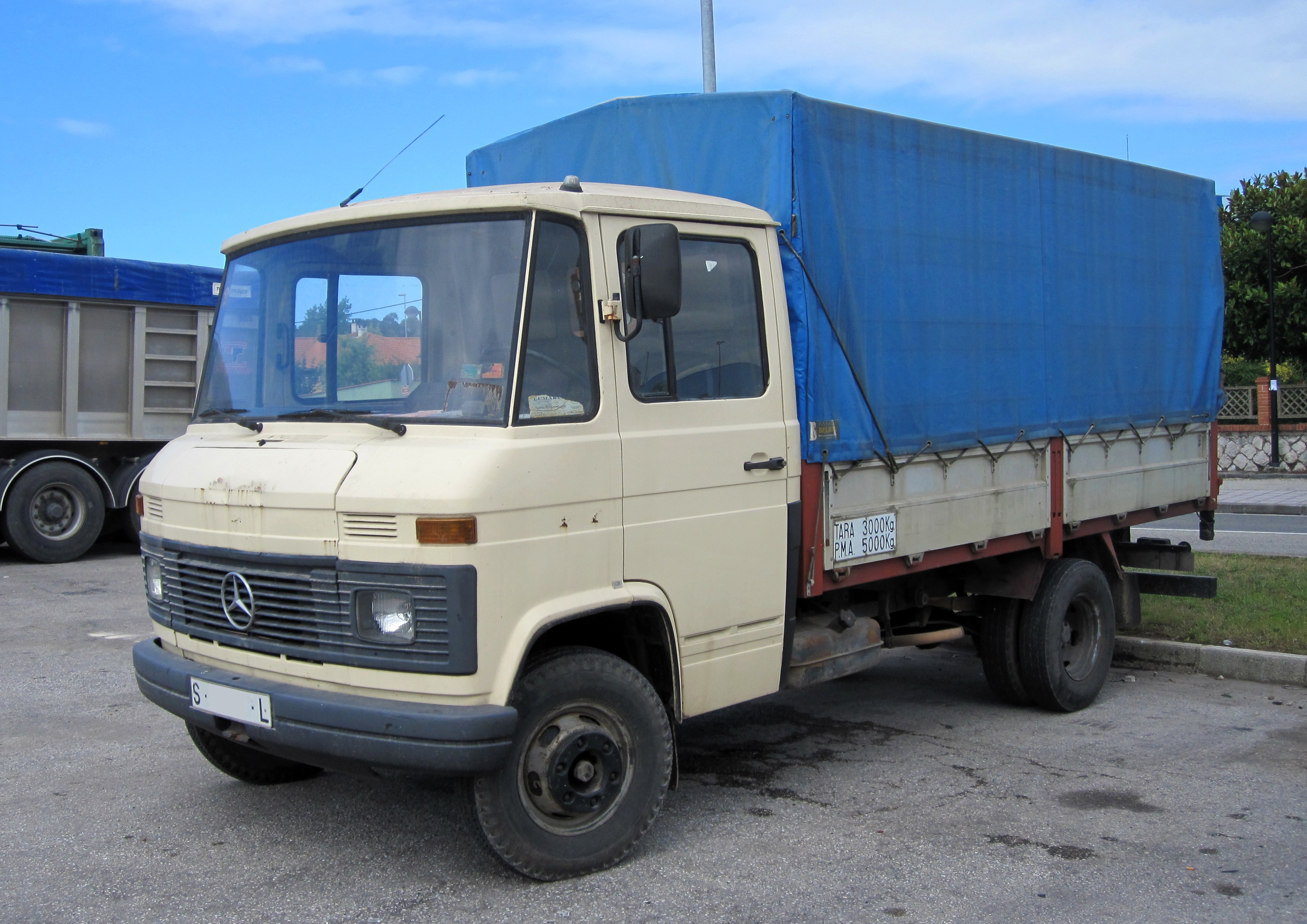 1984 Mercedes-Benz [T2]